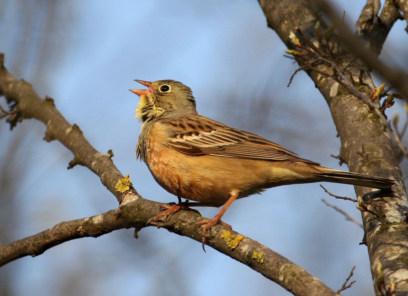 Strnádka záhradná (Emberiza hortulana); Ortolan Bunting Enisalský háj, Delta Dunaja, Rumunsko